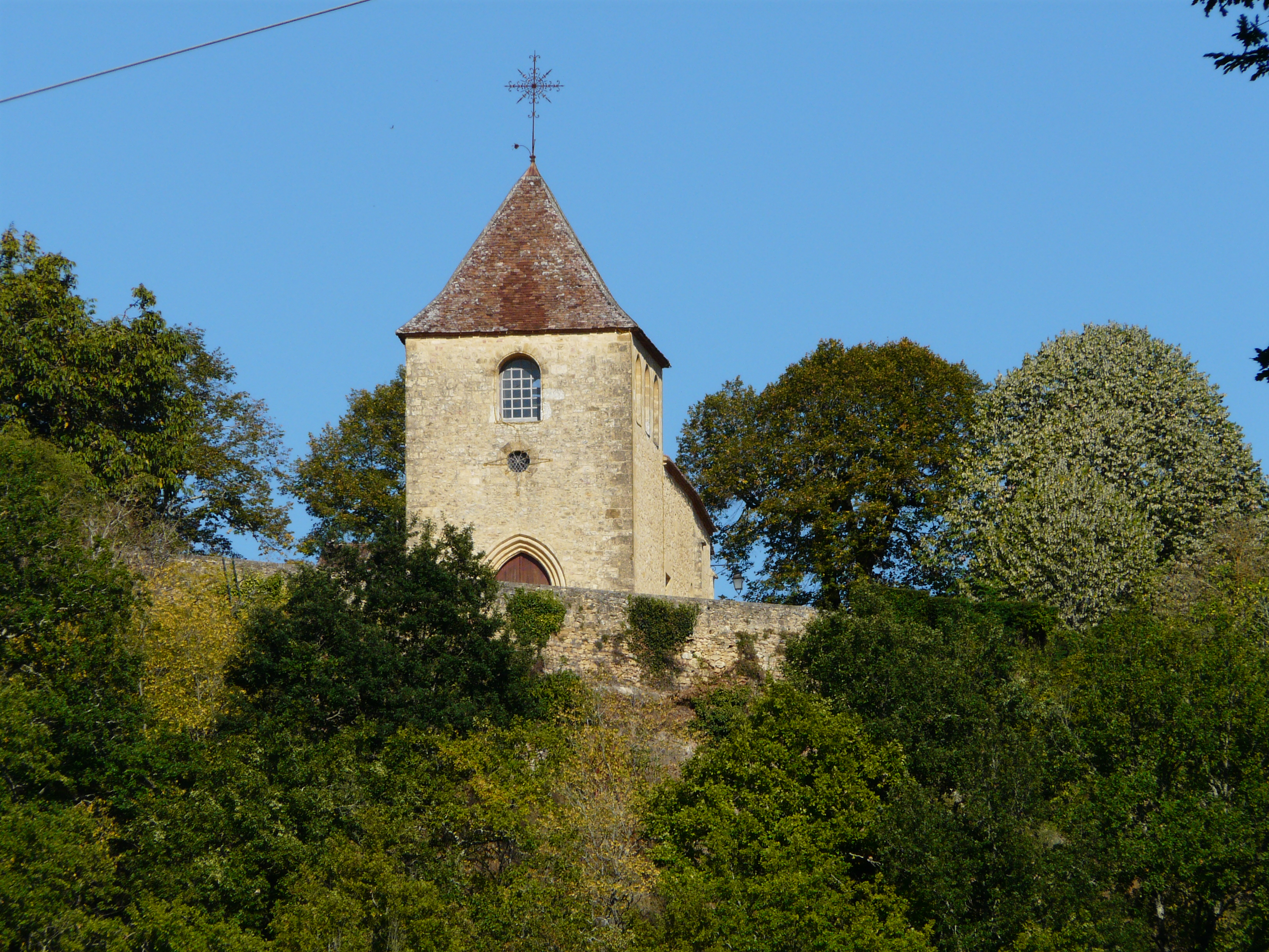 Le clocher de l'église Saint-Médard de Calès, Dordogne, France.